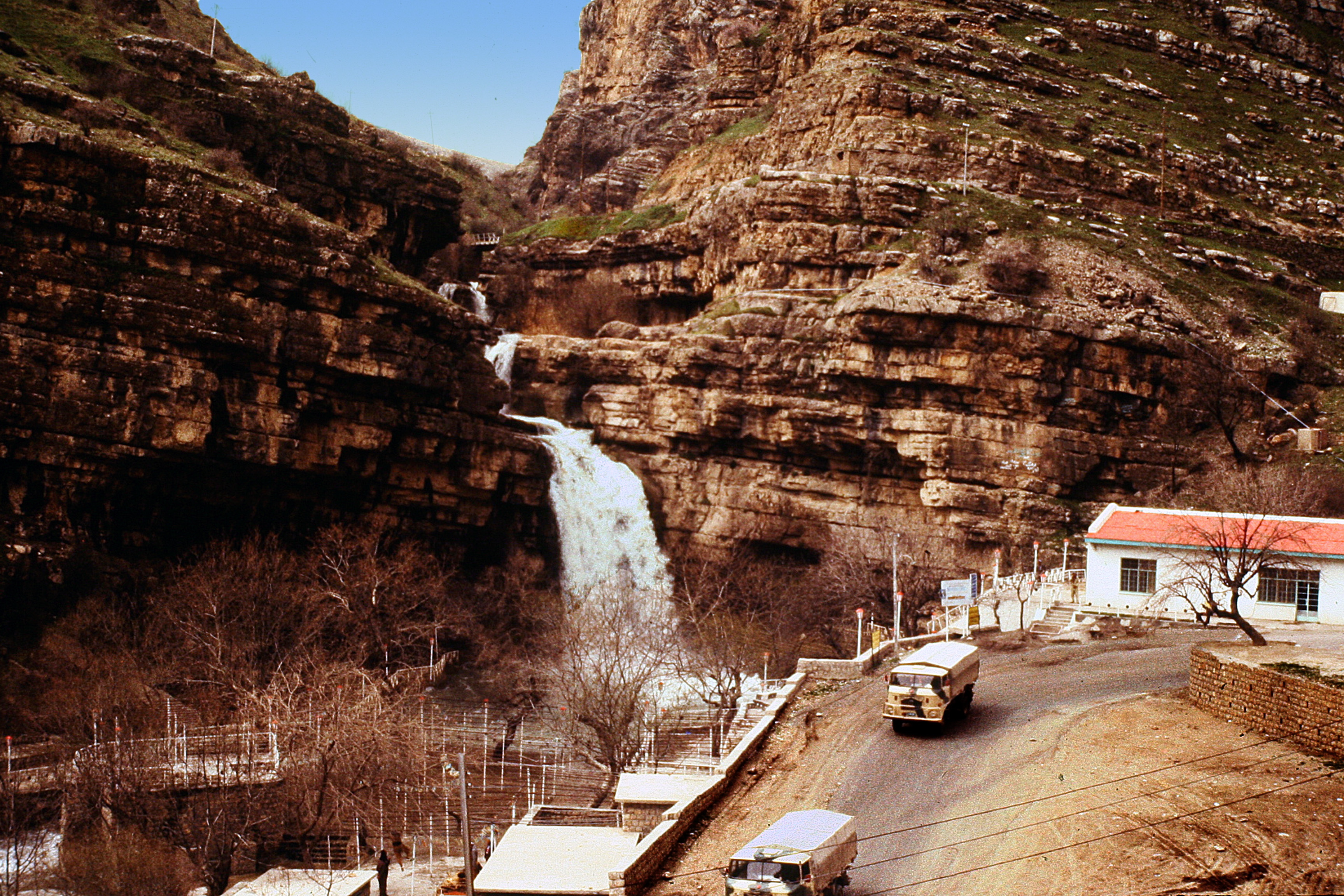 Wodospad Gali Ali Bek w irackim Kurdystanie